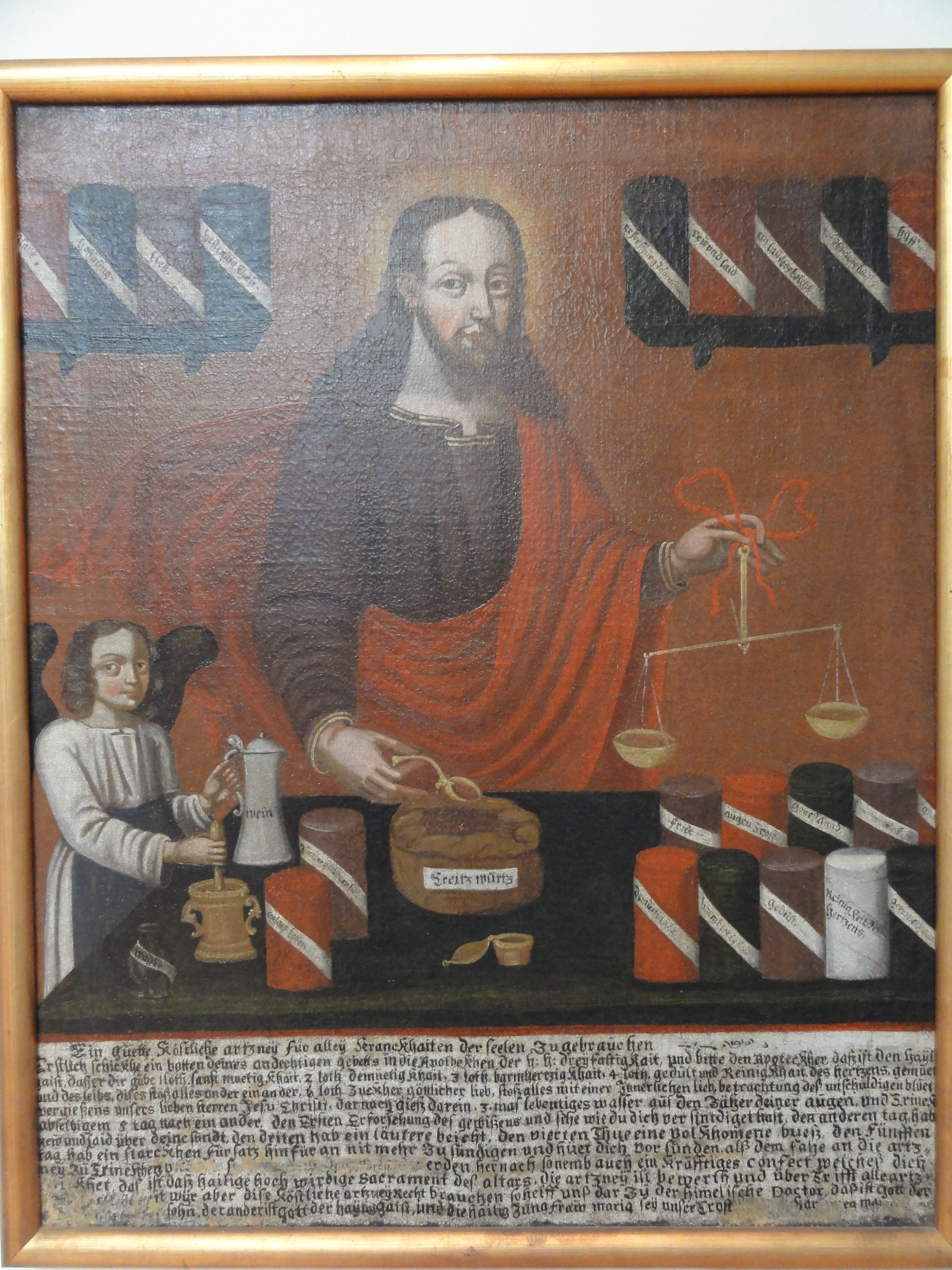 Christus als Apotheker (Heiler und Tröster; Christus medicus) mit helfendem Engel